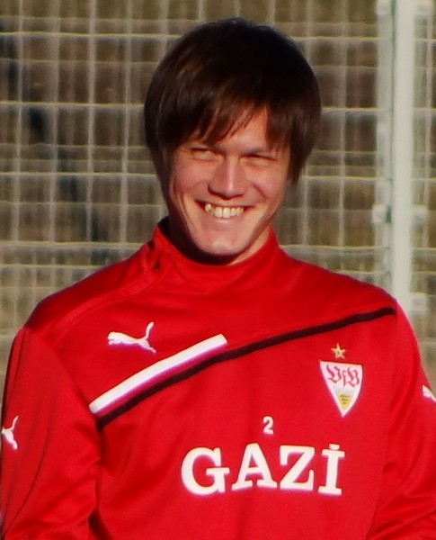 Gotoku Sakai. Neuzugang im Winter 2011/12. Aufgenommen von